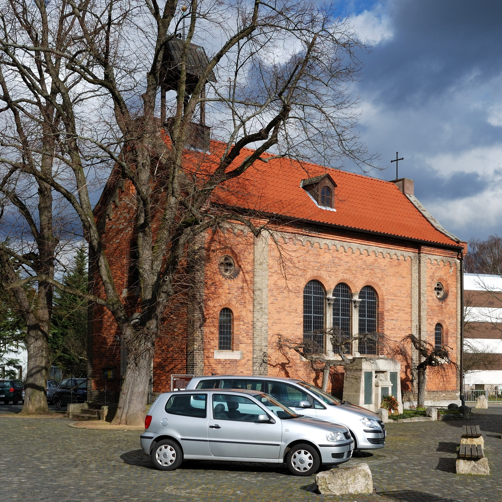 Alte Dorfkirche von Querum, Braunschweig, Hinter der Kirche 3